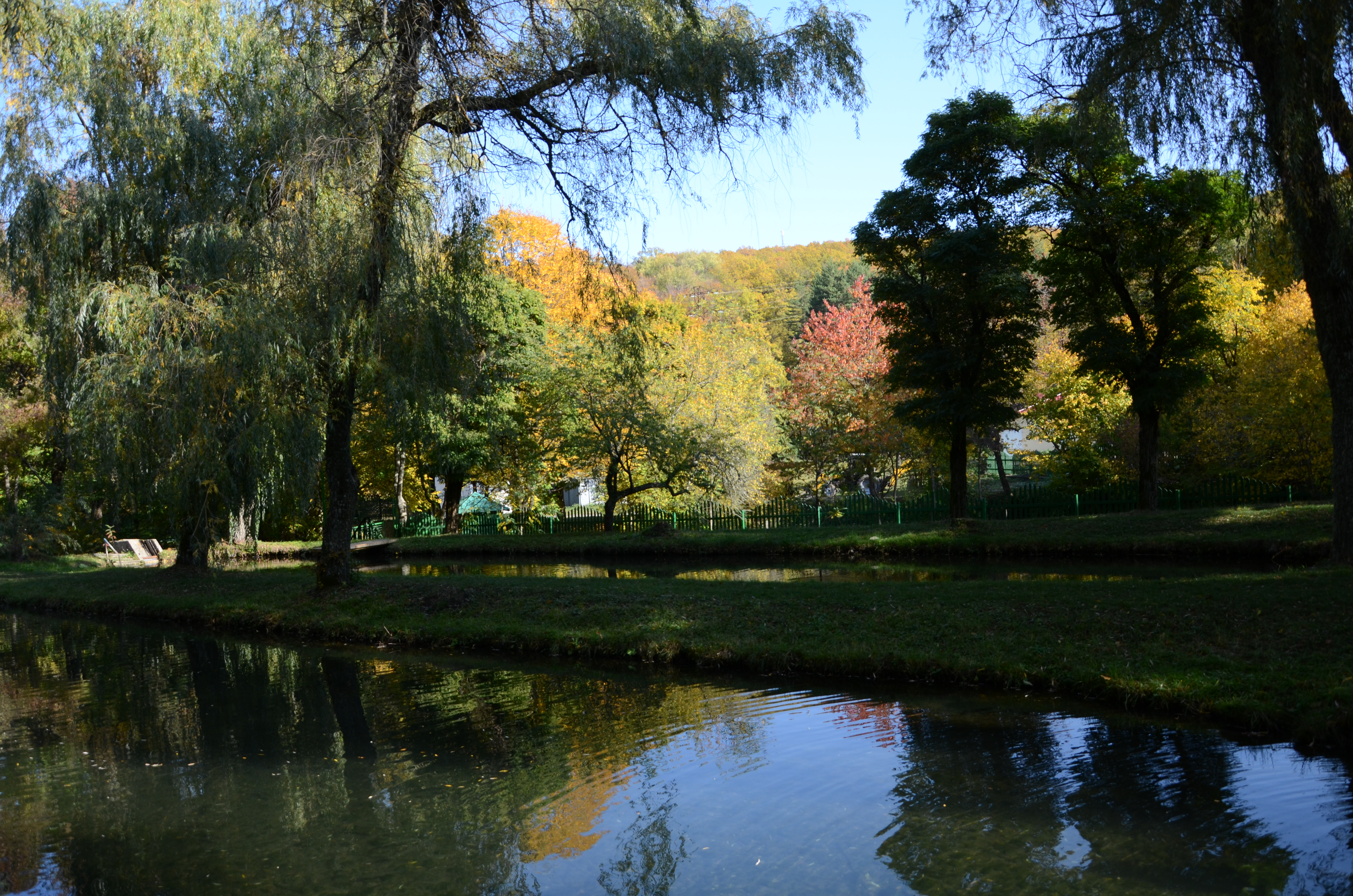 Парк_в_Алуштинском_заповеднике_(1)